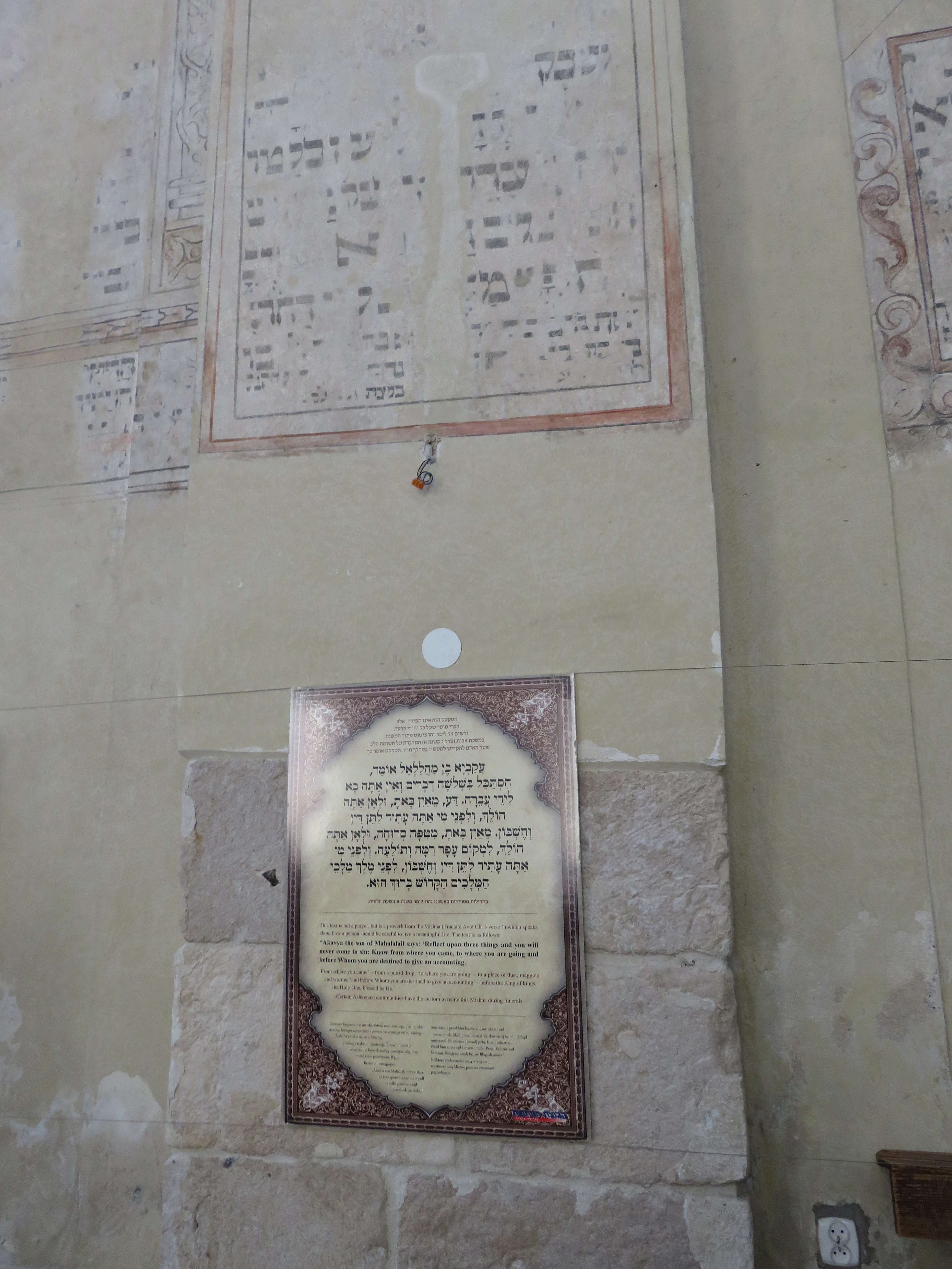 ציורי טיח על קירות בית הכנסת אייזיק שול. קרקוב (3).jpg